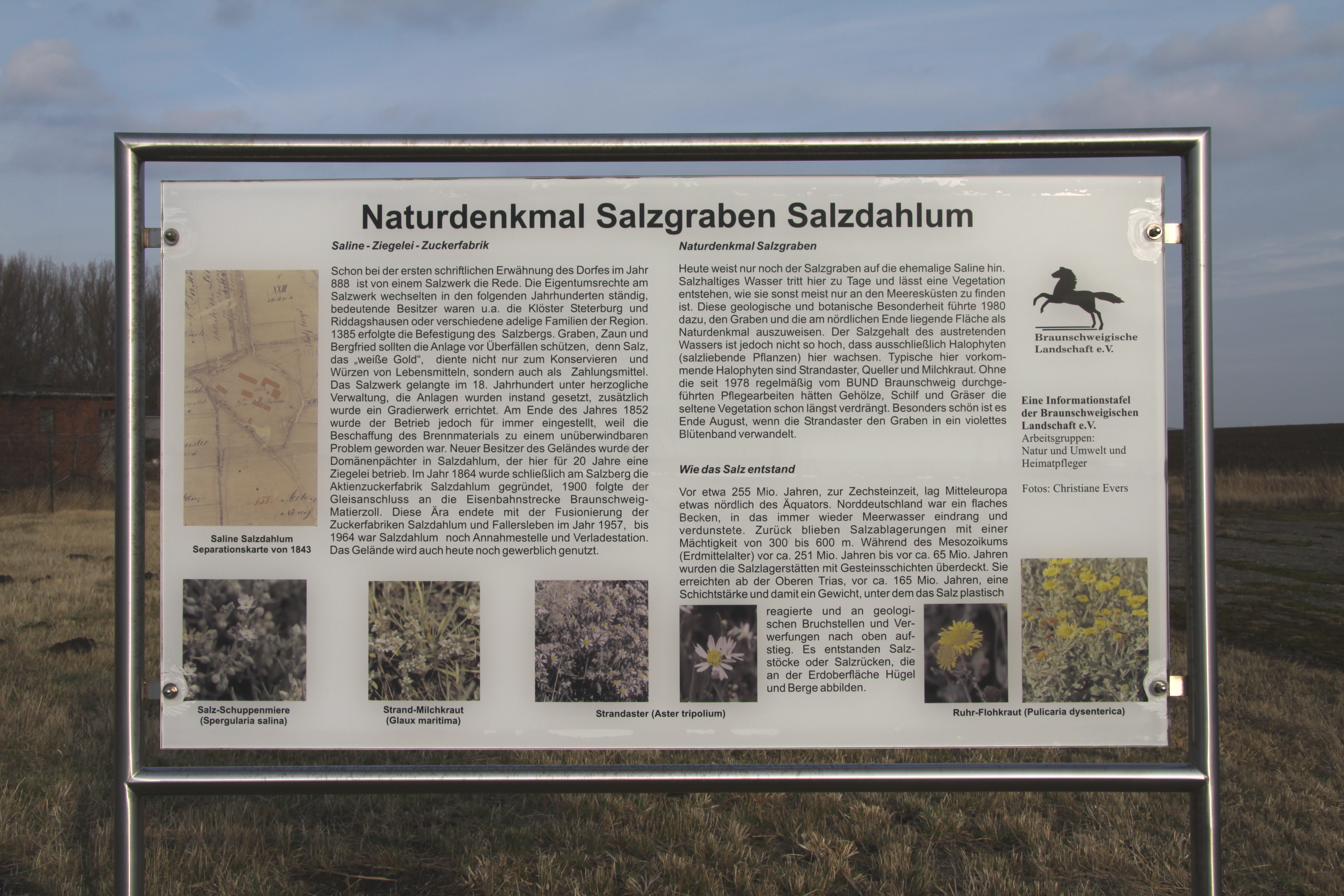 Informationstafel zum Naturdenkmal „Salzgraben Salzdahlum“, Niedersachsen, Bundesrepublik Deutschland